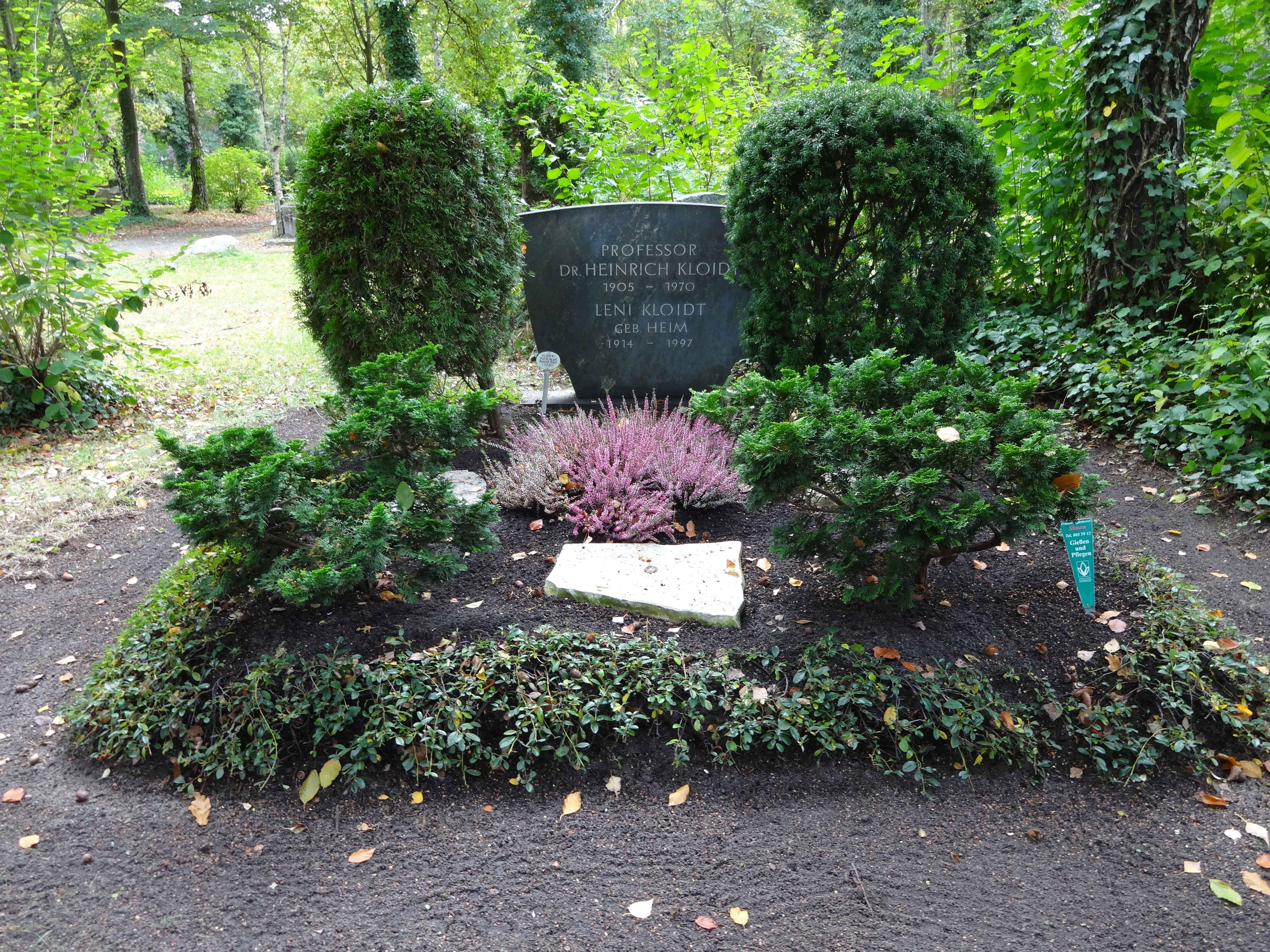 Grab von Prof. Heinrich Kloidt auf dem Waldfriedhof Zehlendorf